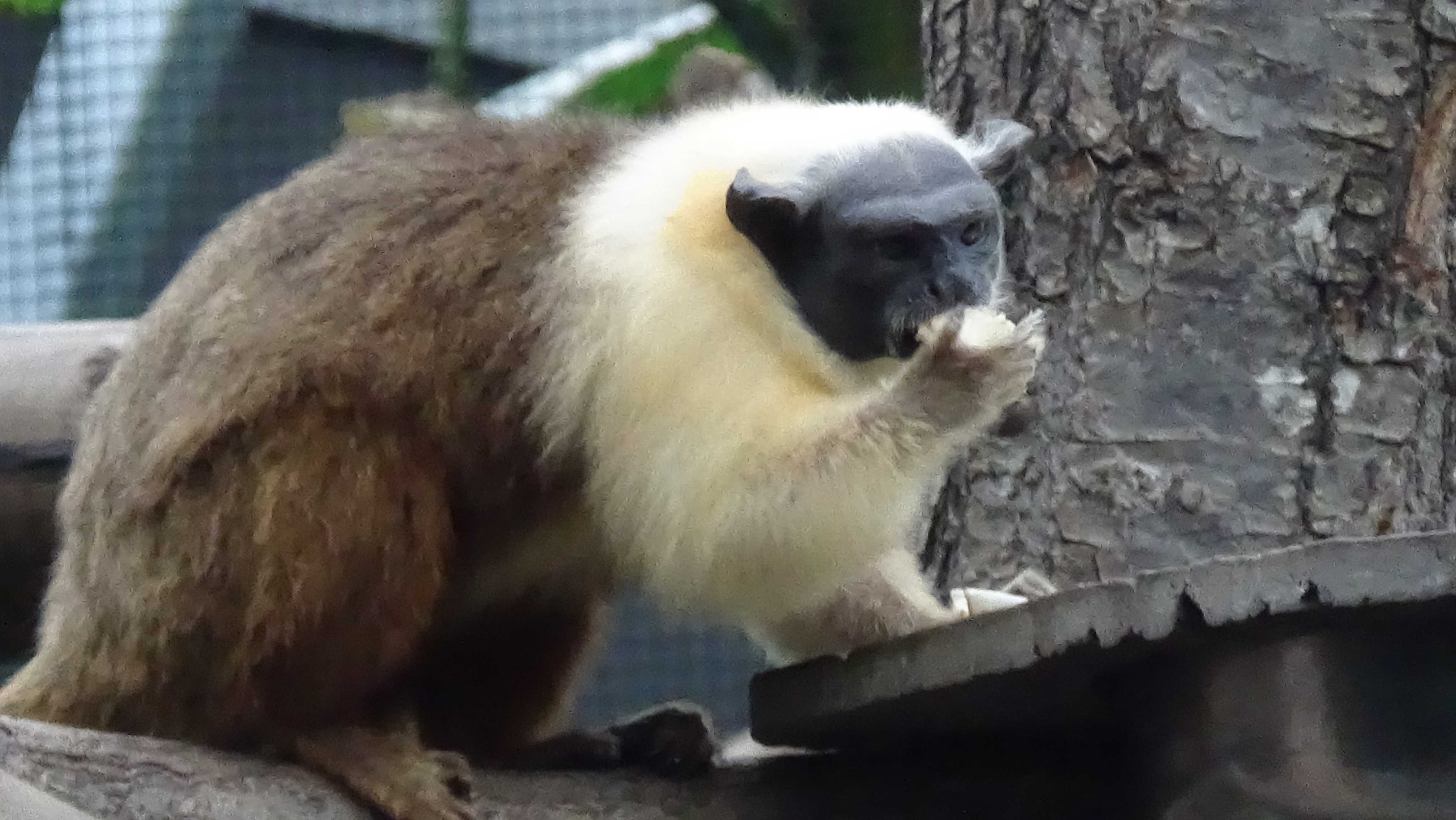 Saguinus bicolor - Adulte session repas - Parc Zoologique de Paris, Ile de France, France - 11/2014